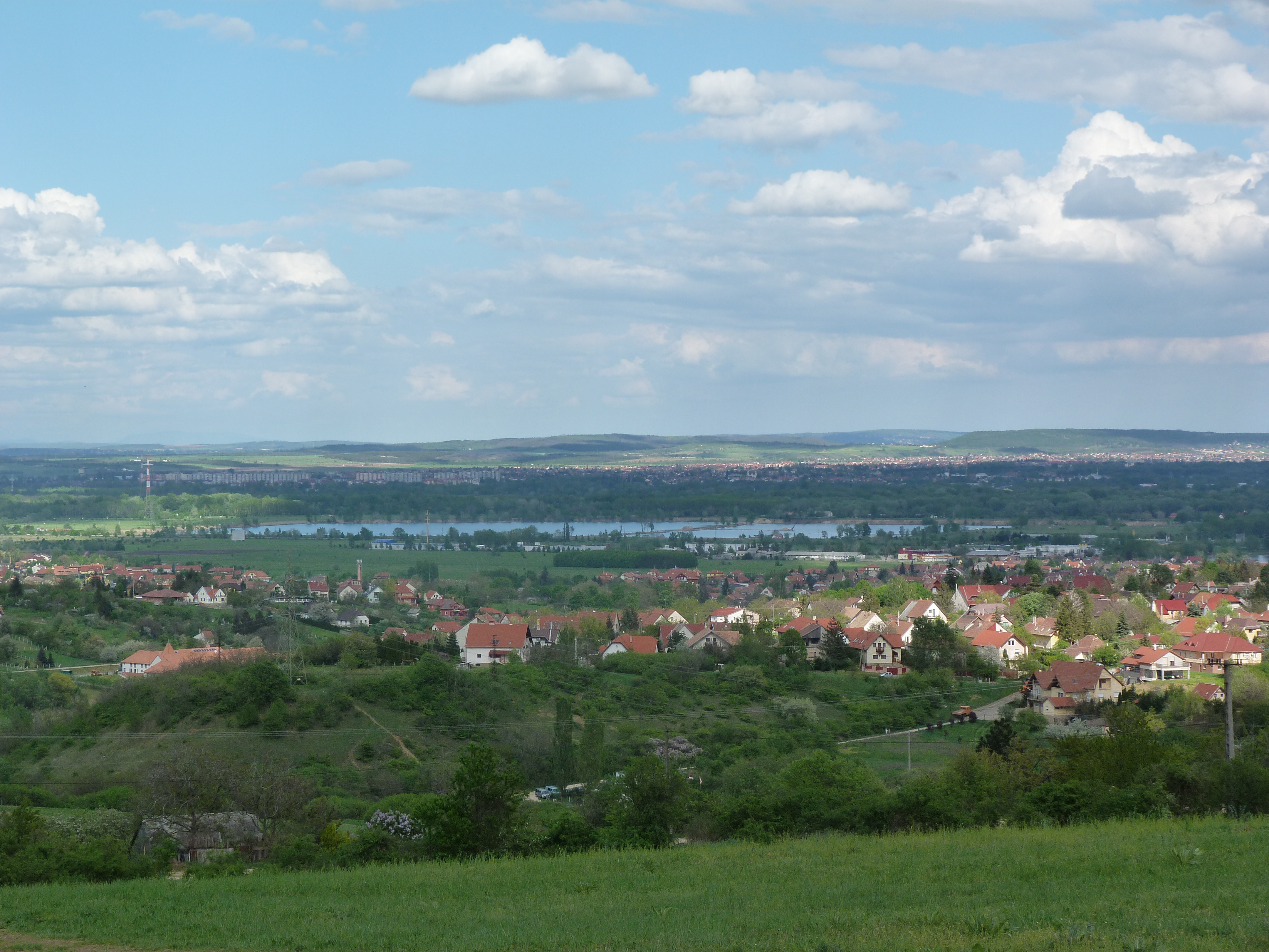 A felvételek 2013. Április 28 –án vasárnap készültek Budakalászon. Omszki tó.